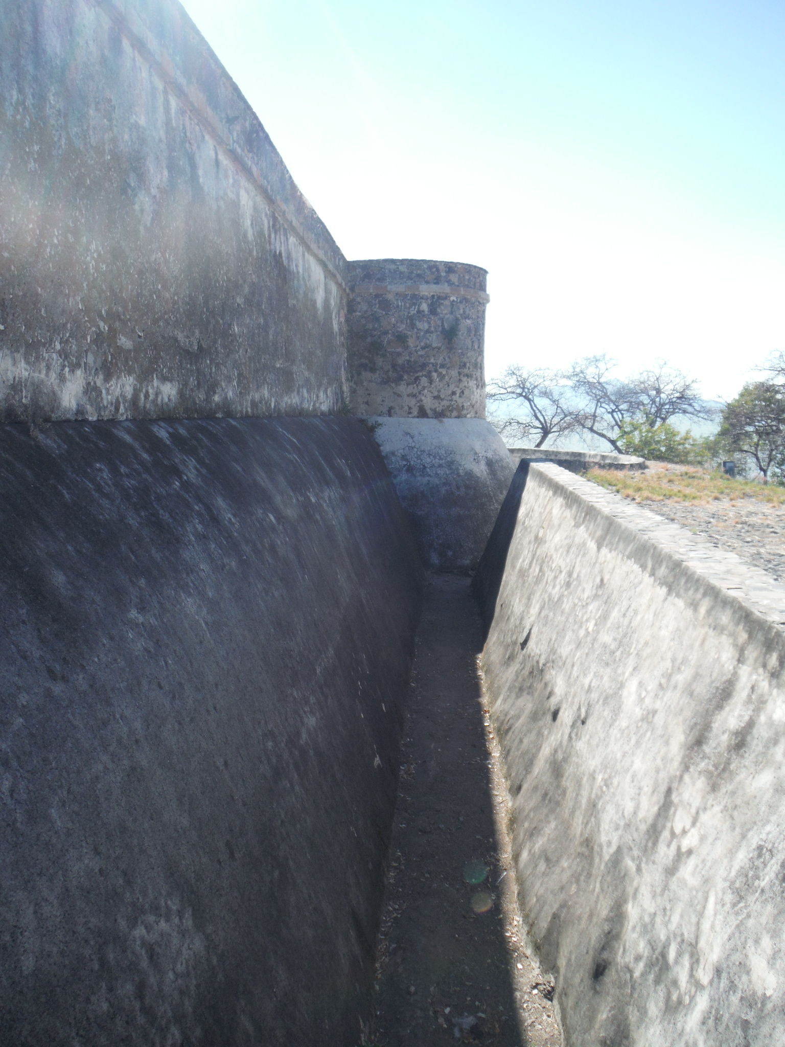 Fosa del presidio ubicado en la Isla de Mezcala.